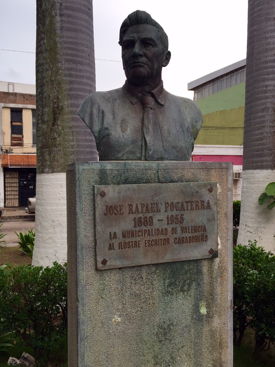 Busto de José Rafael Pocaterra en las afueras del Museo de Arte Valencia, estado Carabobo.